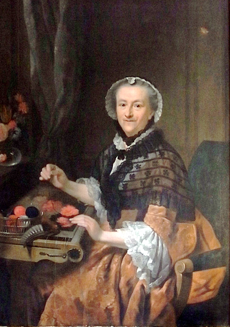 Clara Henriette Ebell geb. Bötticher (1705–1776), Ehefrau von Georg Wilhelm Ebell (1696–1770), Abt in Loccum. Ölgemälde; in Privatbesitz